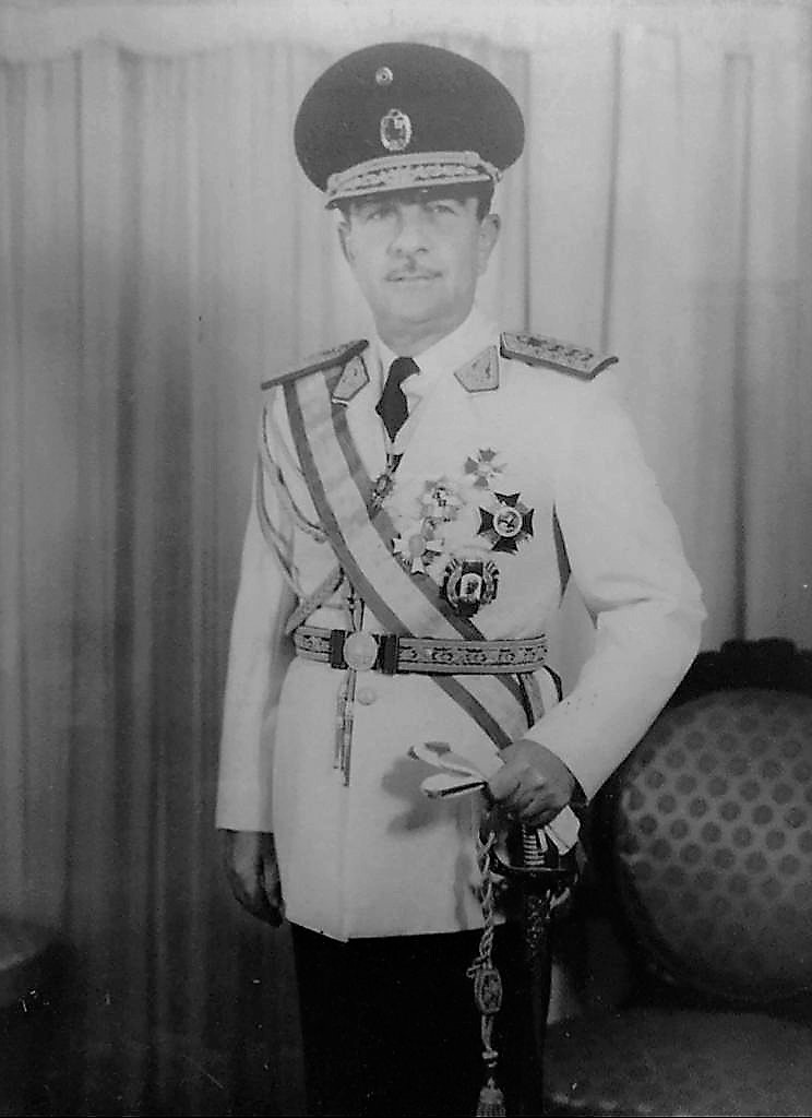 despacho